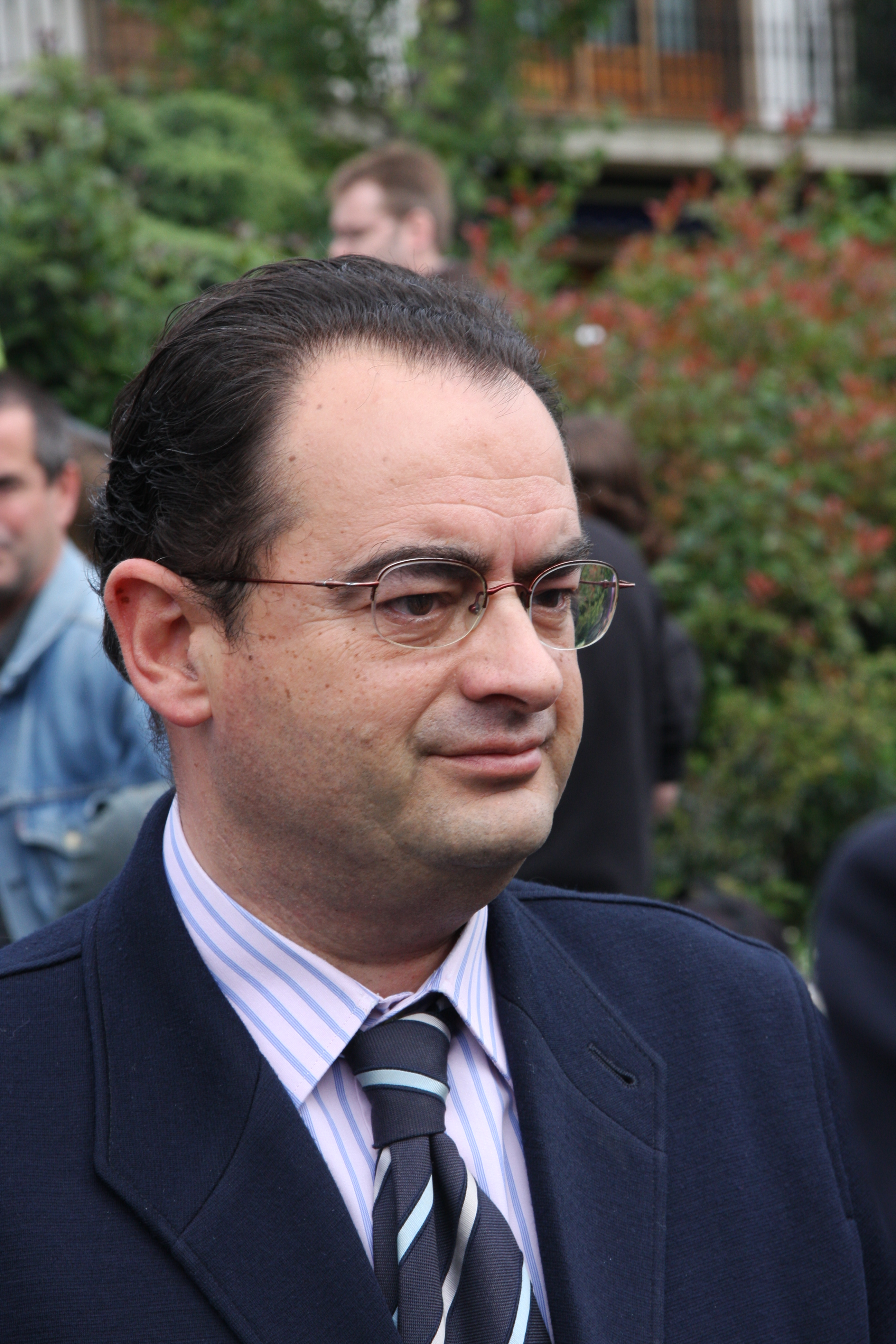 2008ko maiatzaren 19an, goizeko 0:50ak aldera, eztanda egin zuen lehergailuak zituen furgoneta bat Areetan dagoen Abrako Erret Itsas Klubean. Ordu bat lehenago Bizkaiko DYAra deitu zuen gizonezko batek ETAren izenean bonbaren abisua emateko. Eztandaren ondorioz, kalte handiak jazo ziren eraikinean eta itsas pasealekuan. Era berean, hainbat etxebizitza eta dendaren beirak puskatu ziren.